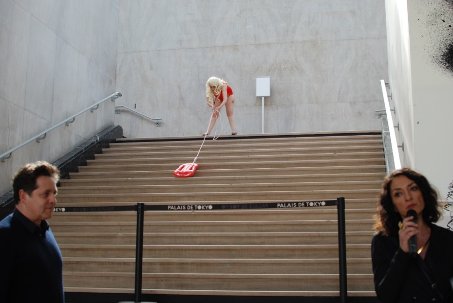 Sisyphus is a woman - présentation de la performance d' Arnaud Cohen par Jean de Loisy et Vittoria Matarrese au Palais de Tokyo, Paris, France en 2016